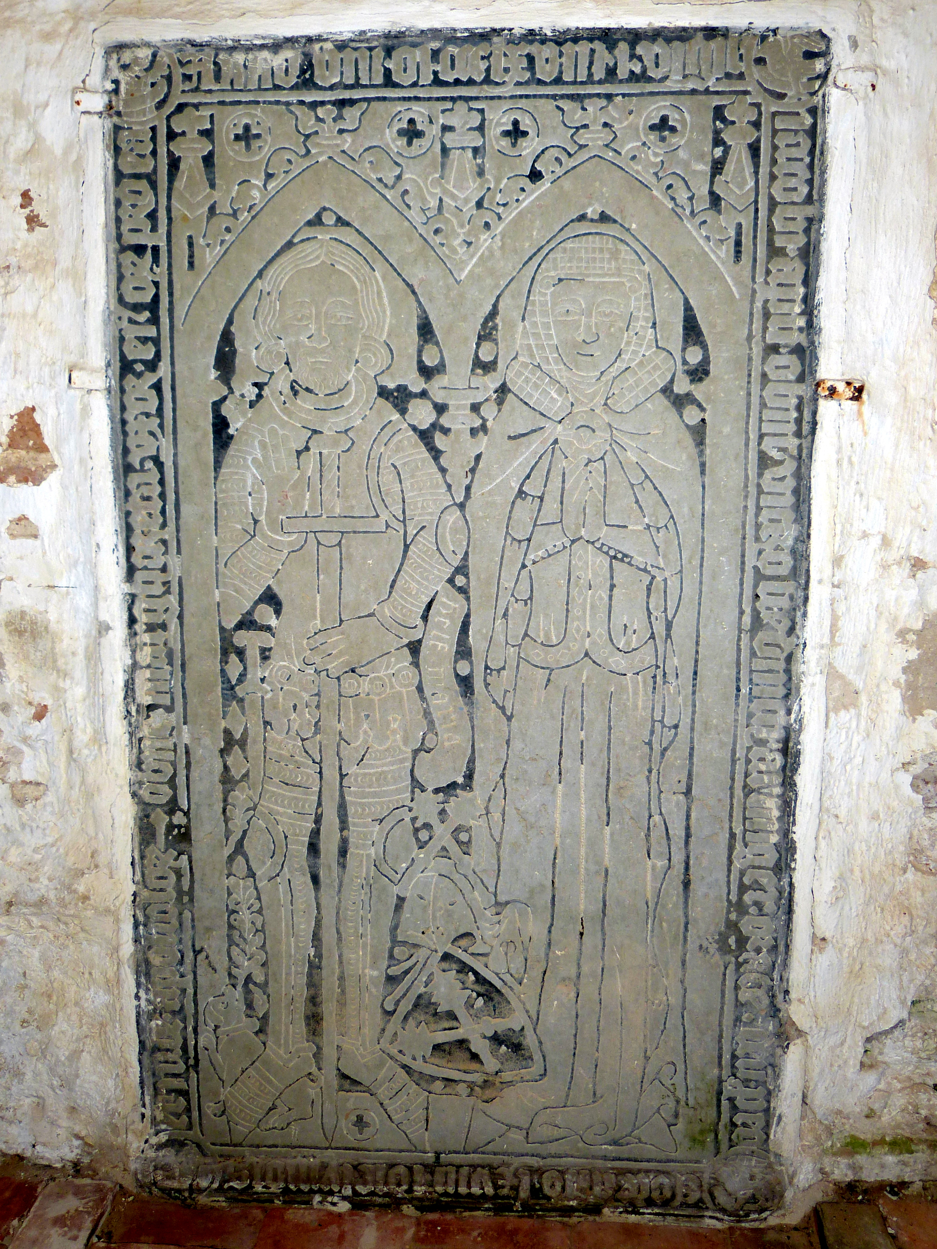 Kirche in Pinnow, Murchin, Grabplatte für Vicko von Stedingk und seine Frau (1368)